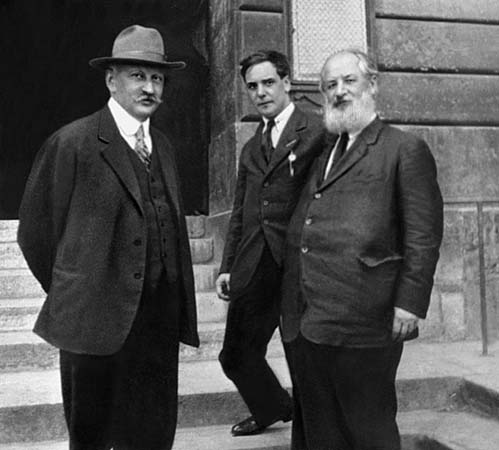 А. Ф. Иоффе, П. Л. Капица и А. Н. Крылов во Франции